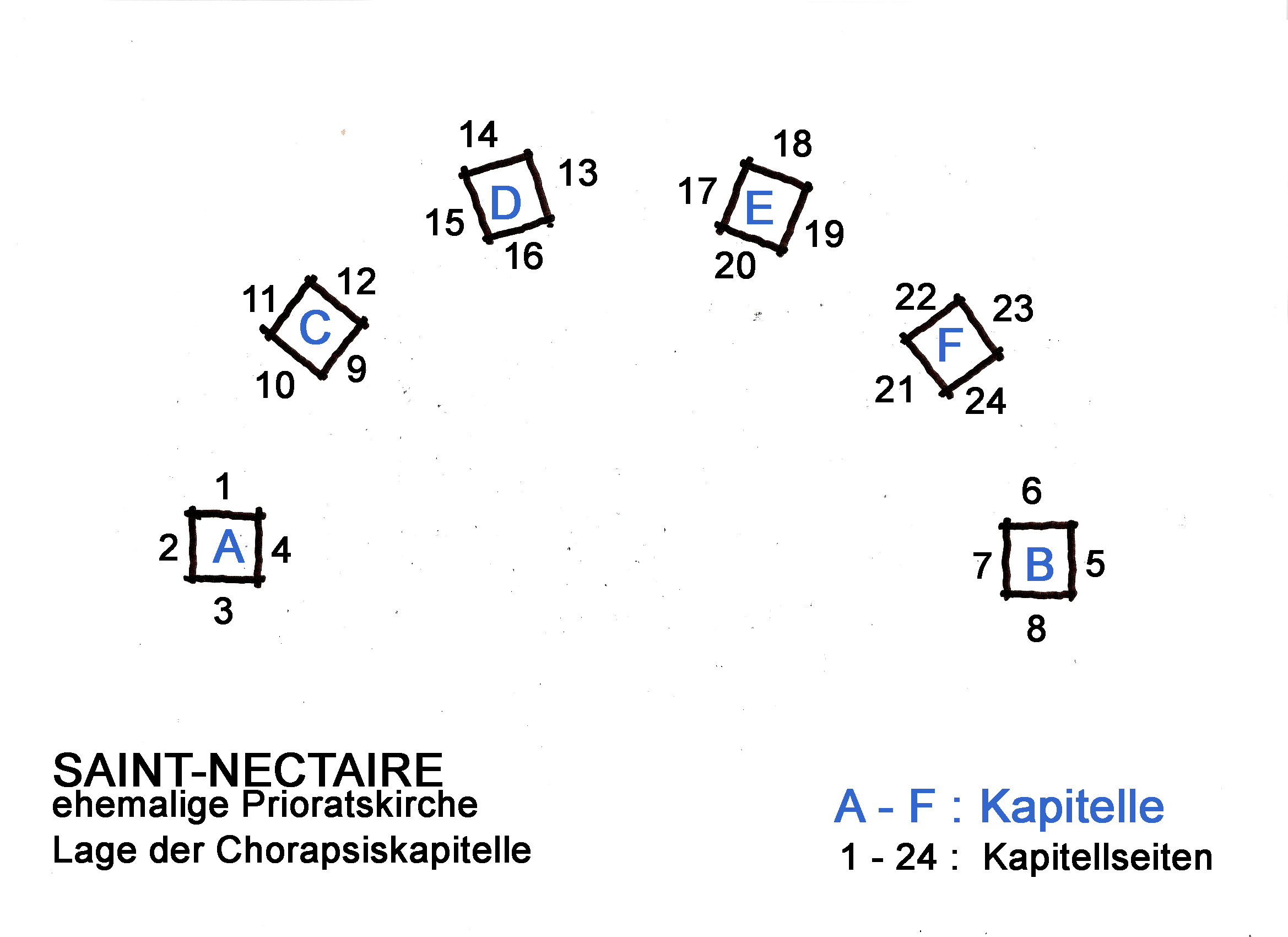 St.-Nectaire, Lage der Chorkapitelle, Handskizze